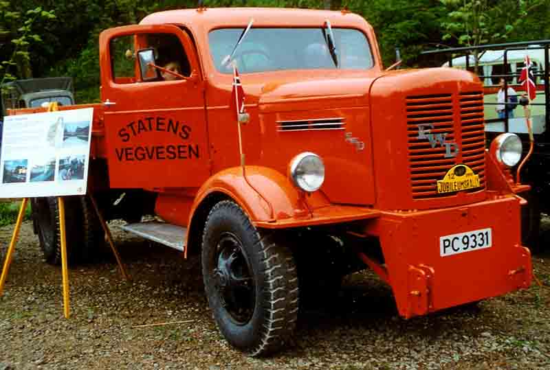 FWD 4x4 Truck 1940